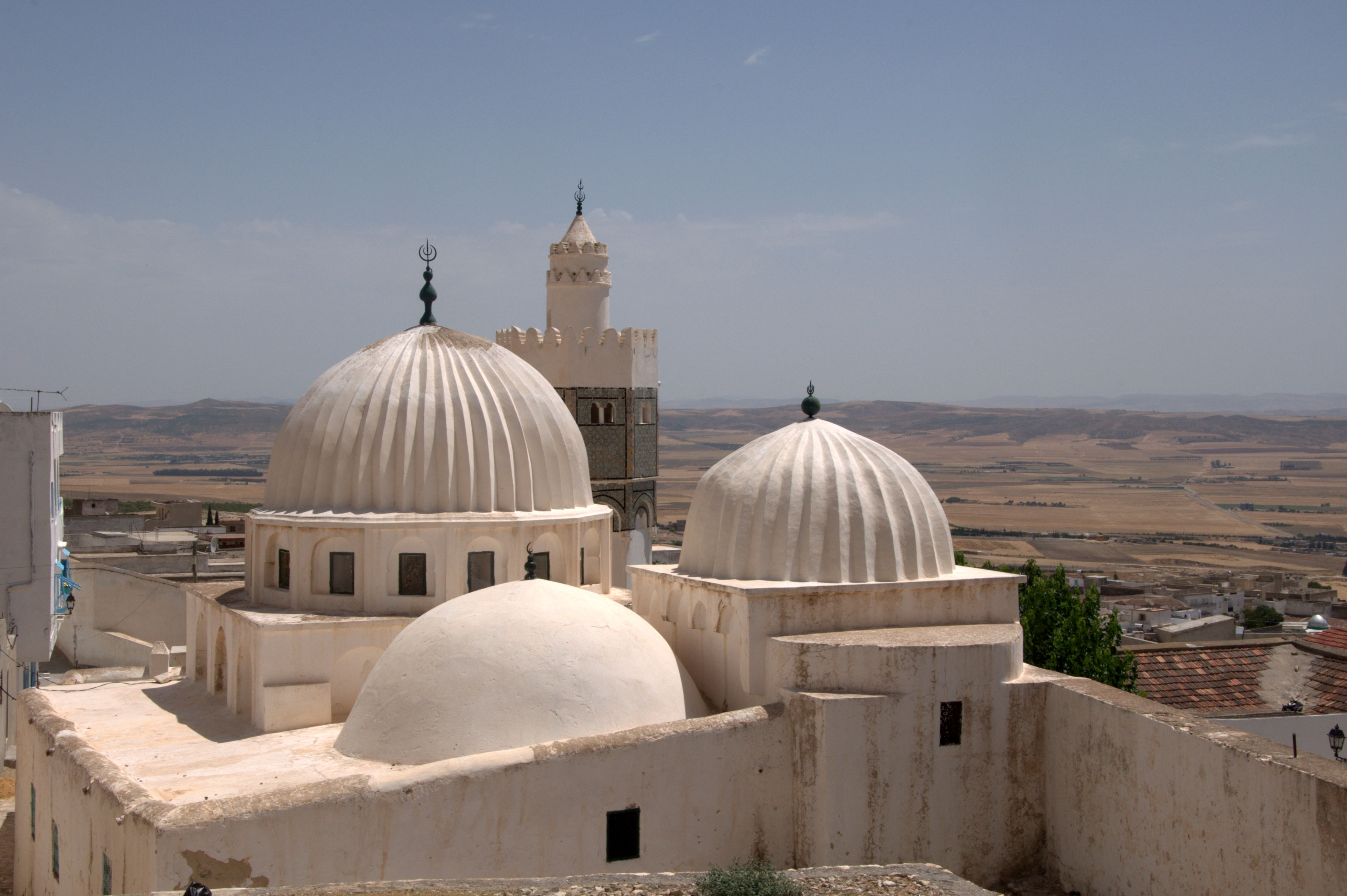 Coupoles de la mosquée et zaouïa de Sidi Bou Makhlouf au Kef (Tunisie)